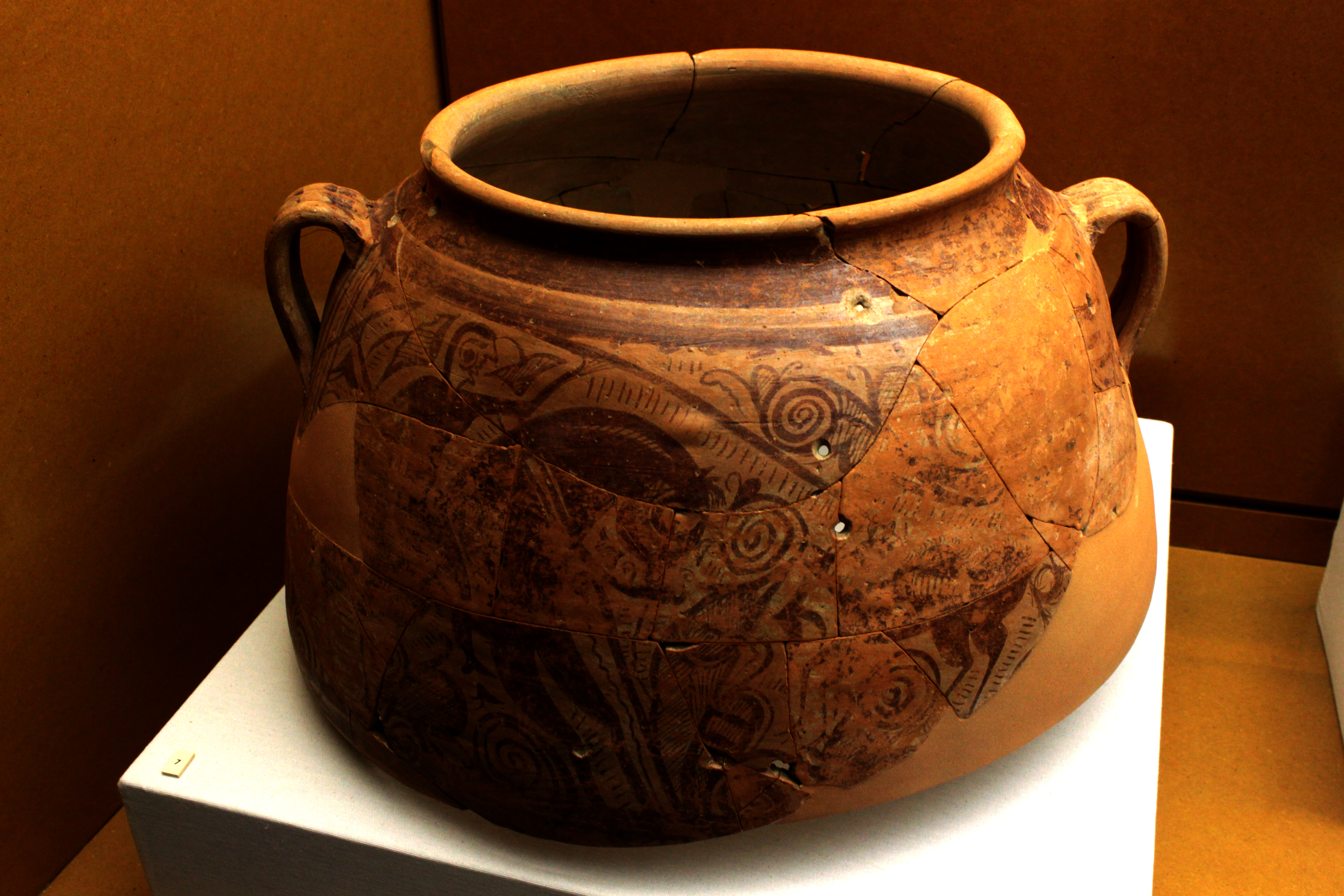 Tinaja con decoración figuara del siglo II al I aC del yacimiento de Tossal de la Cala, Benidorm. Depositada en el Museo de Prehistoria de Valencia, Comunidad valenciana, España.